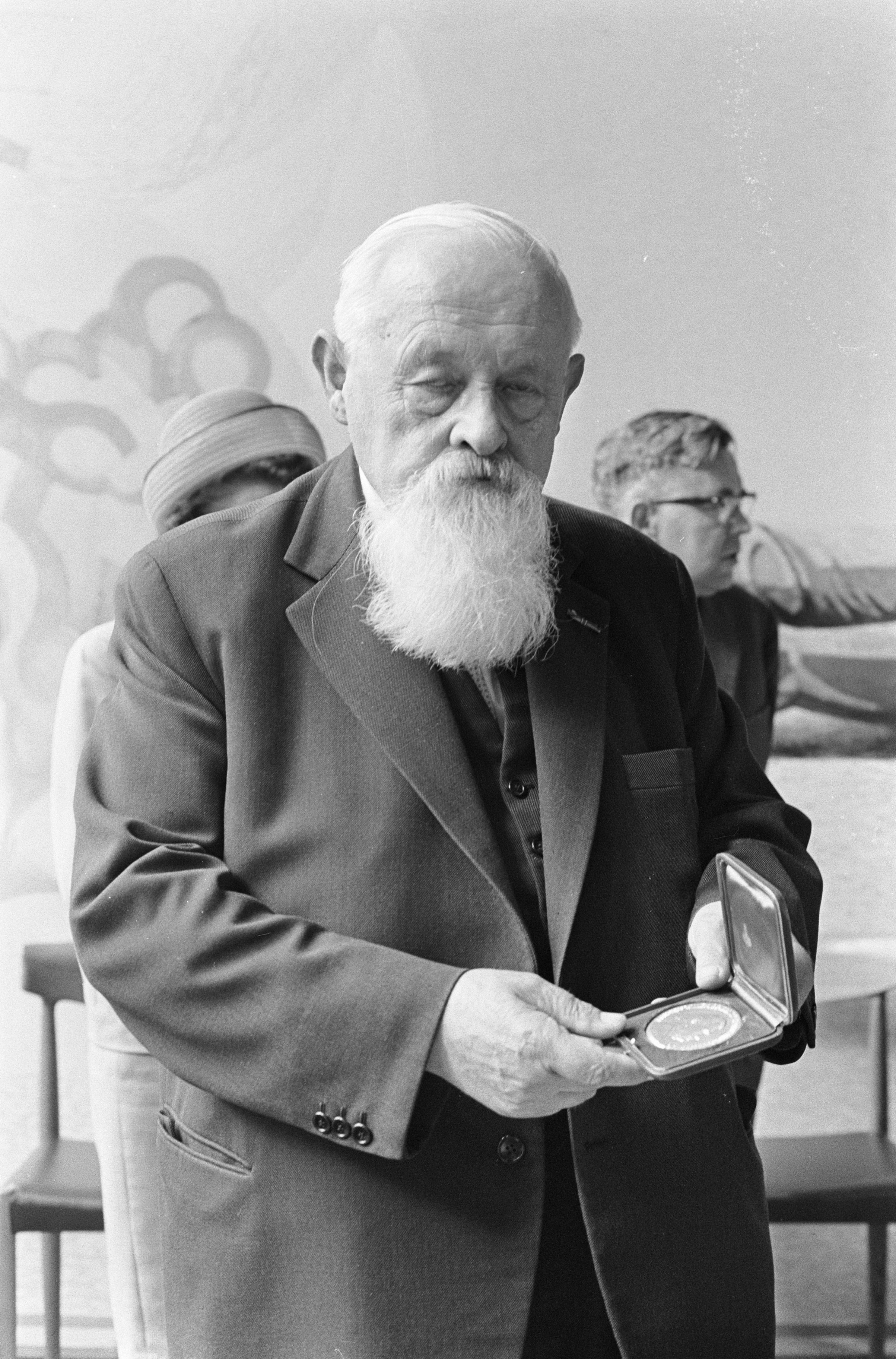 Collectie / Archief : Fotocollectie Anefo Reportage / Serie : Opdracht Academie voor Wetenschappen, Prof. dr. E. van Slogteren ontvangt Beyerinck-Virologie prijs Beschrijving : Prof. dr. E. van Slogteren ontvangt Beyerinck-Virologie prijs Annotatie : Opdracht Academie voor Wetenschappen. Van Slogteren (geb. 1922) was stichter en directeur van het Laboratorium voor Bloembollenonderzoek te Lisse. Datum : 25 juni 1966 Locatie : Amsterdam Trefwoorden : portretten, prijsuitreikingen, wetenschappelijke prijzen Persoonsnaam : Slogteren, E. van Fotograaf : Fotograaf Onbekend / Anefo, [onbekend] Auteursrechthebbende : Nationaal Archief Materiaalsoort : Negatief (zwart/wit) Nummer archiefinventaris : bekijk toegang 2.24.01.05 Bestanddeelnummer : 919-2862